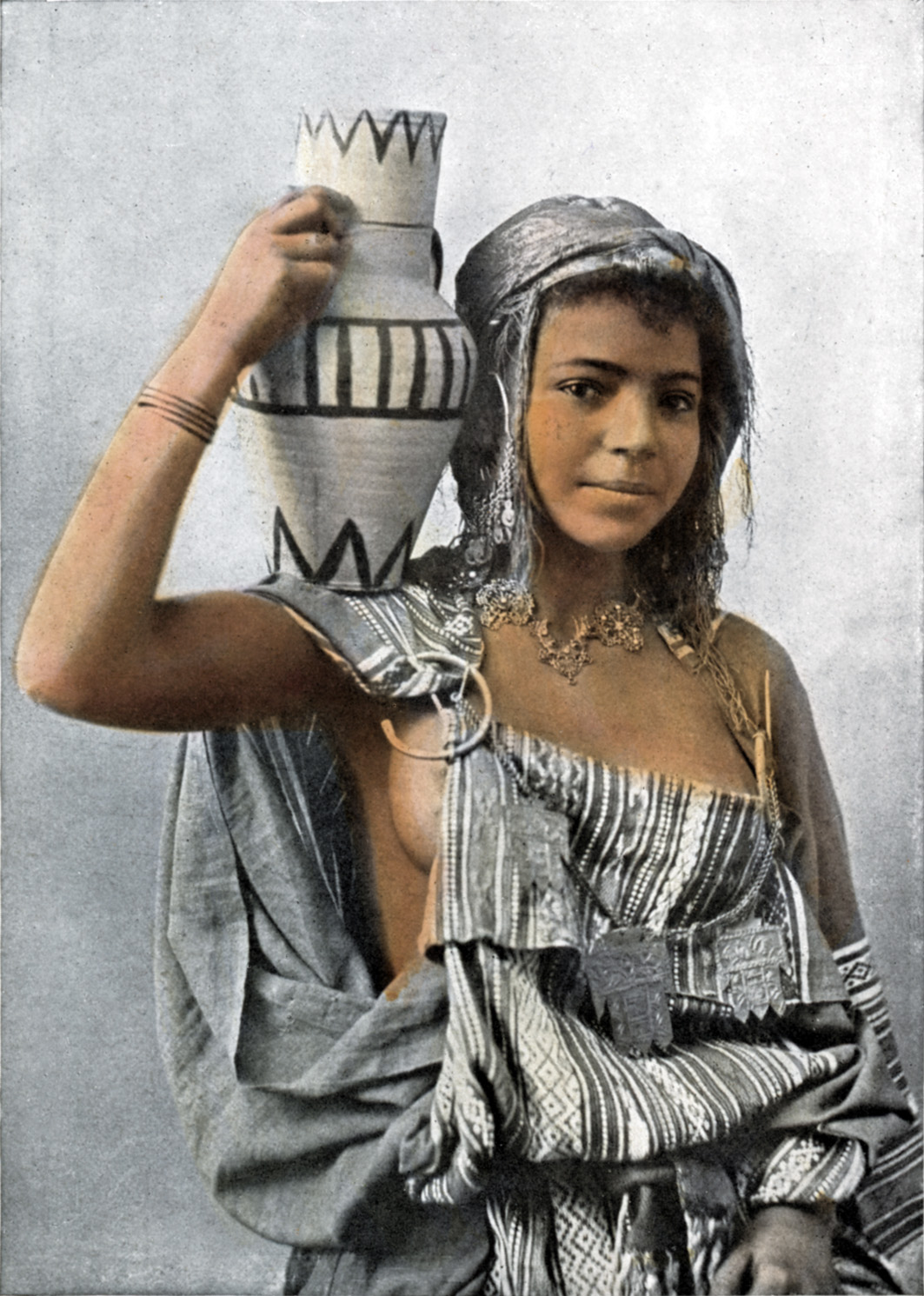 Algerishe Berberin.